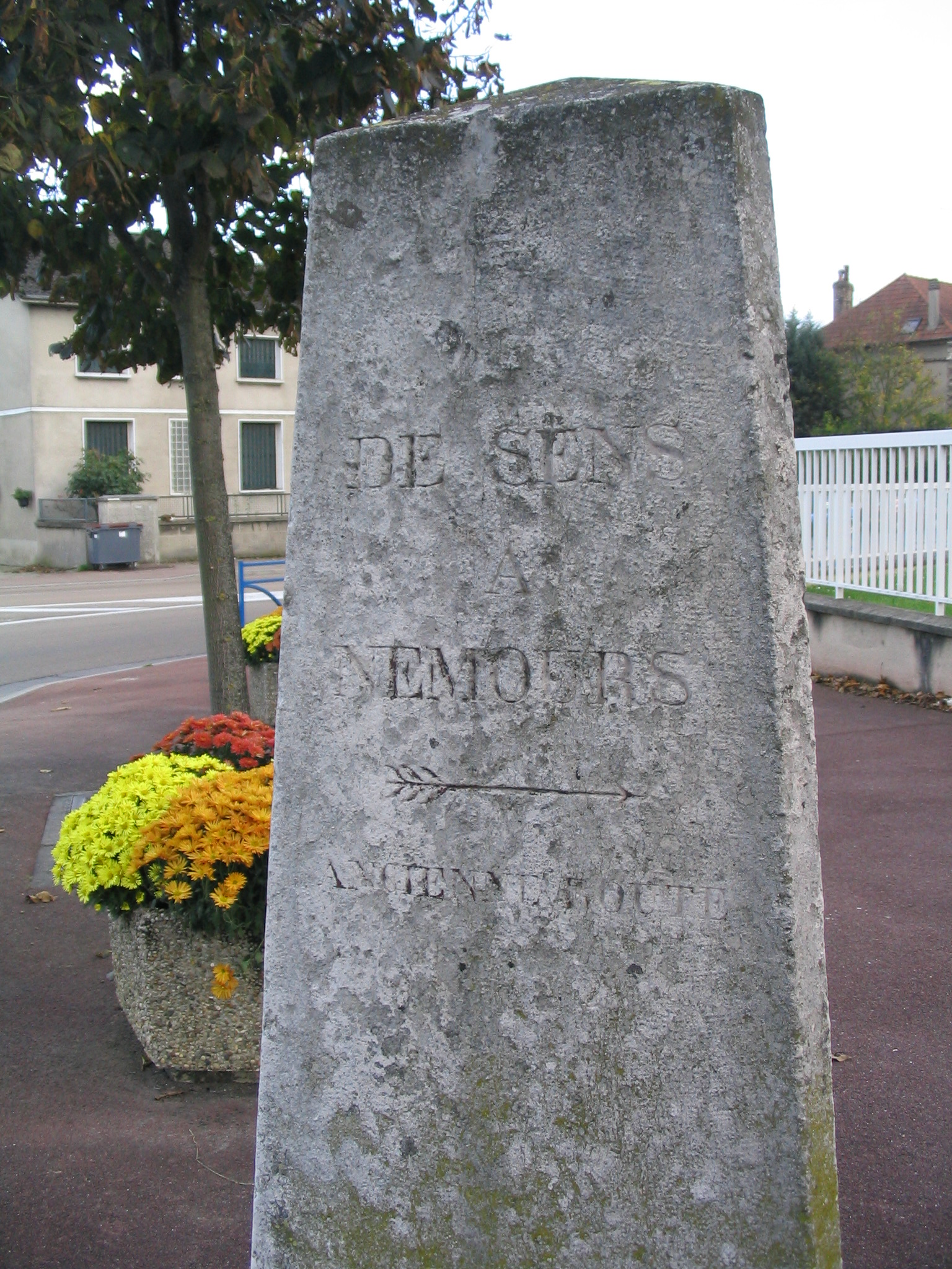 Borne placée à l'intersection de la route Nancy-Orléans et Sens-Nemours à Paron.